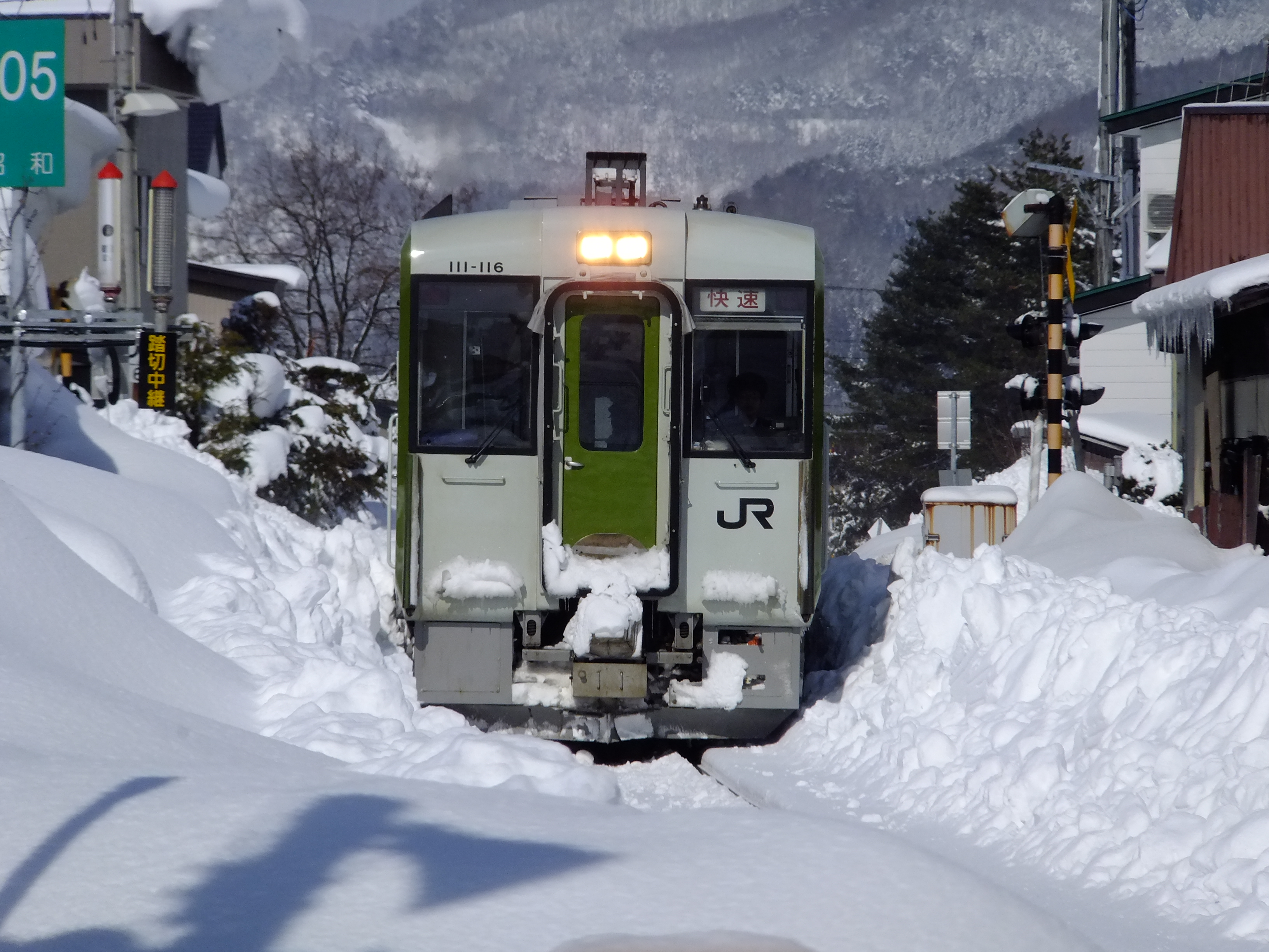 東大館駅に進入する花輪線快速「八幡平」。1か月後の2015年3月14日ダイヤ改正で「八幡平」の愛称は廃止された。